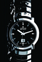 Eine Funkuhr